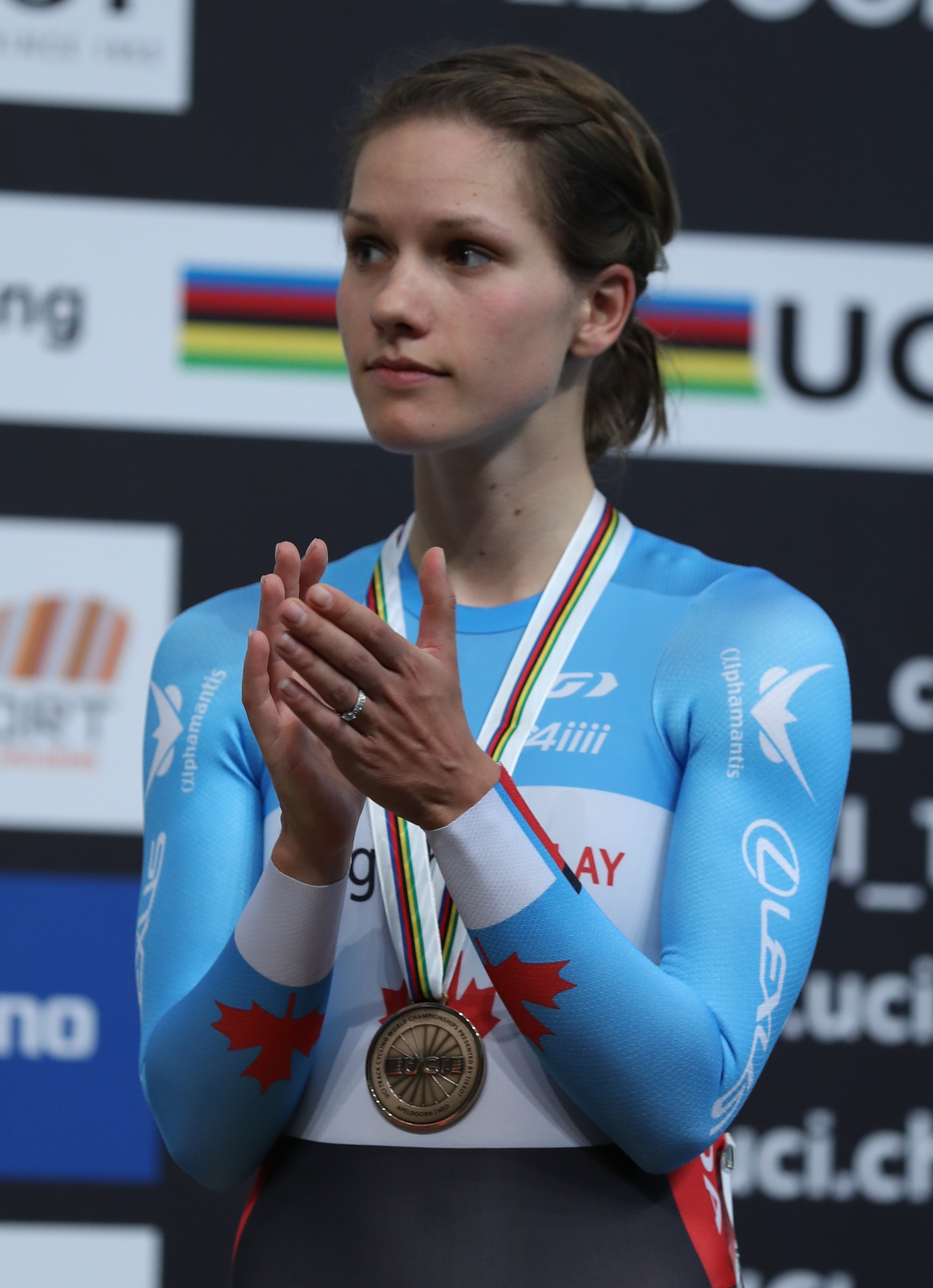 Jasmin Duehring, kanadische Radsportlerin - Bronze im Punktefahren